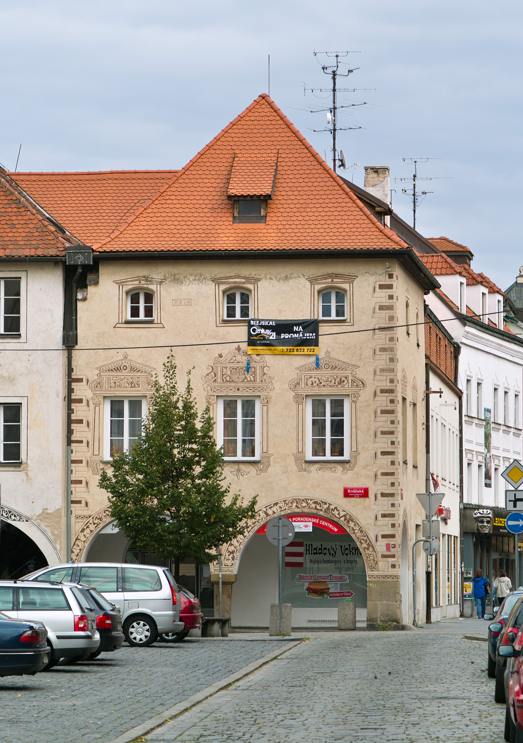 České Budějovice - Kneisslův dům